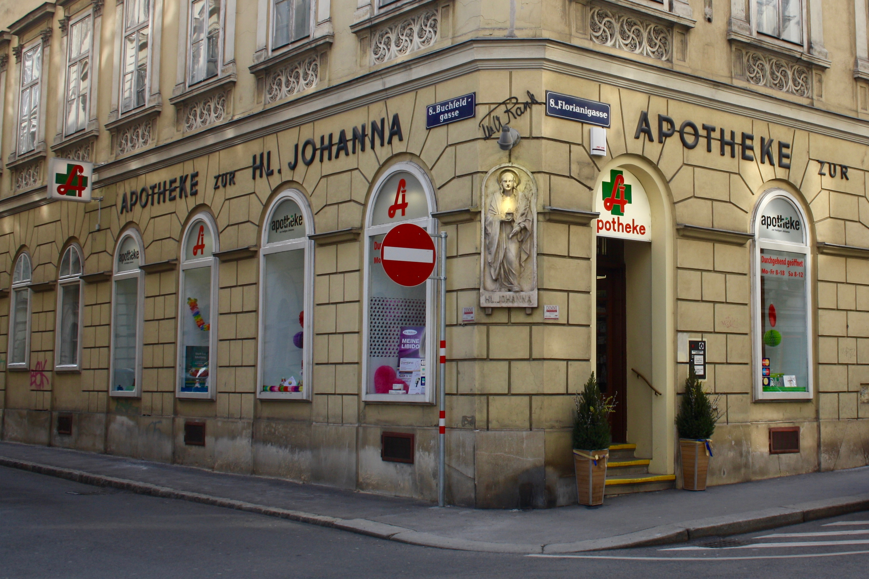 Apotheke zur Heiligen Johanna. Buchfeldgasse 19 / Florianigasse 13, Wien-Josefstadt.